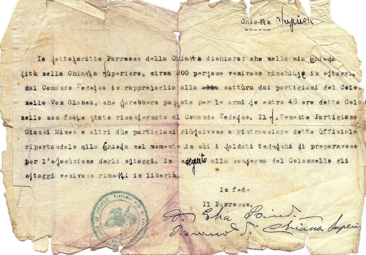 Dichiarazione di don Elia Bindi, parroco della Chiassa Superiore, dove afferma che Gianni Mineo ha salvato circa 200 persone dalla fucilazione da parte dei tedeschi